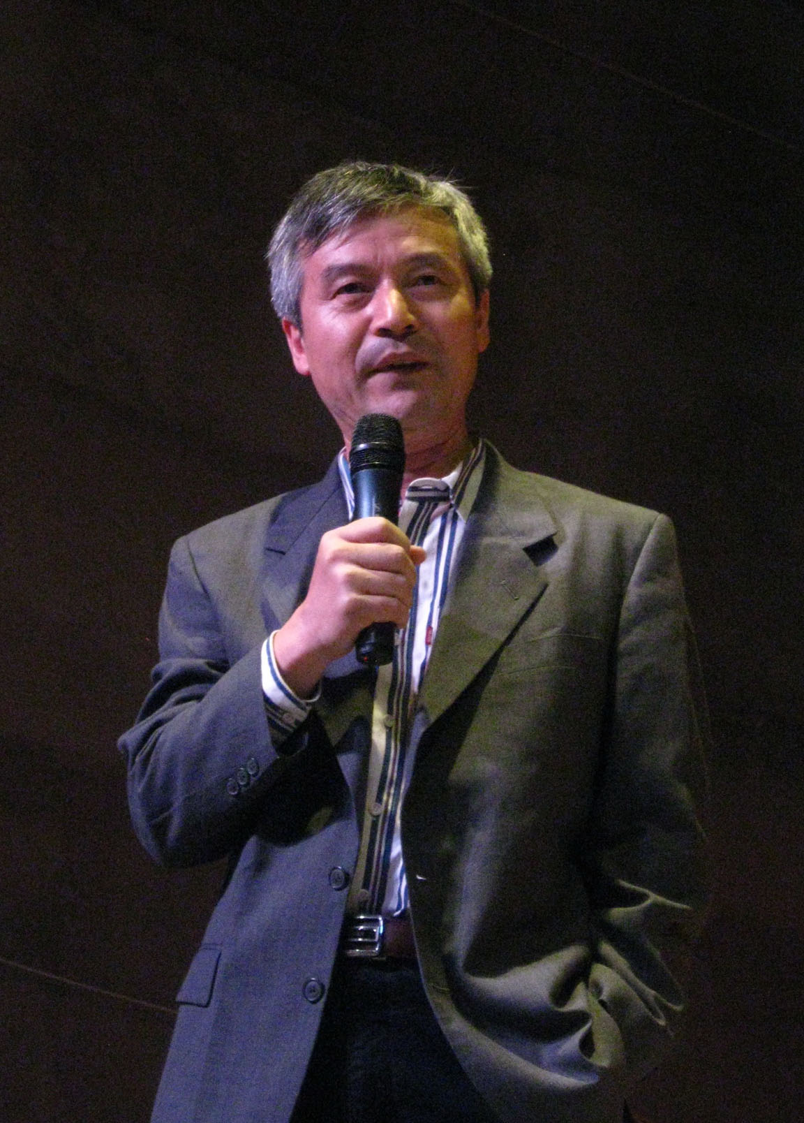 贺卫方在2011理想国沙龙上发言。